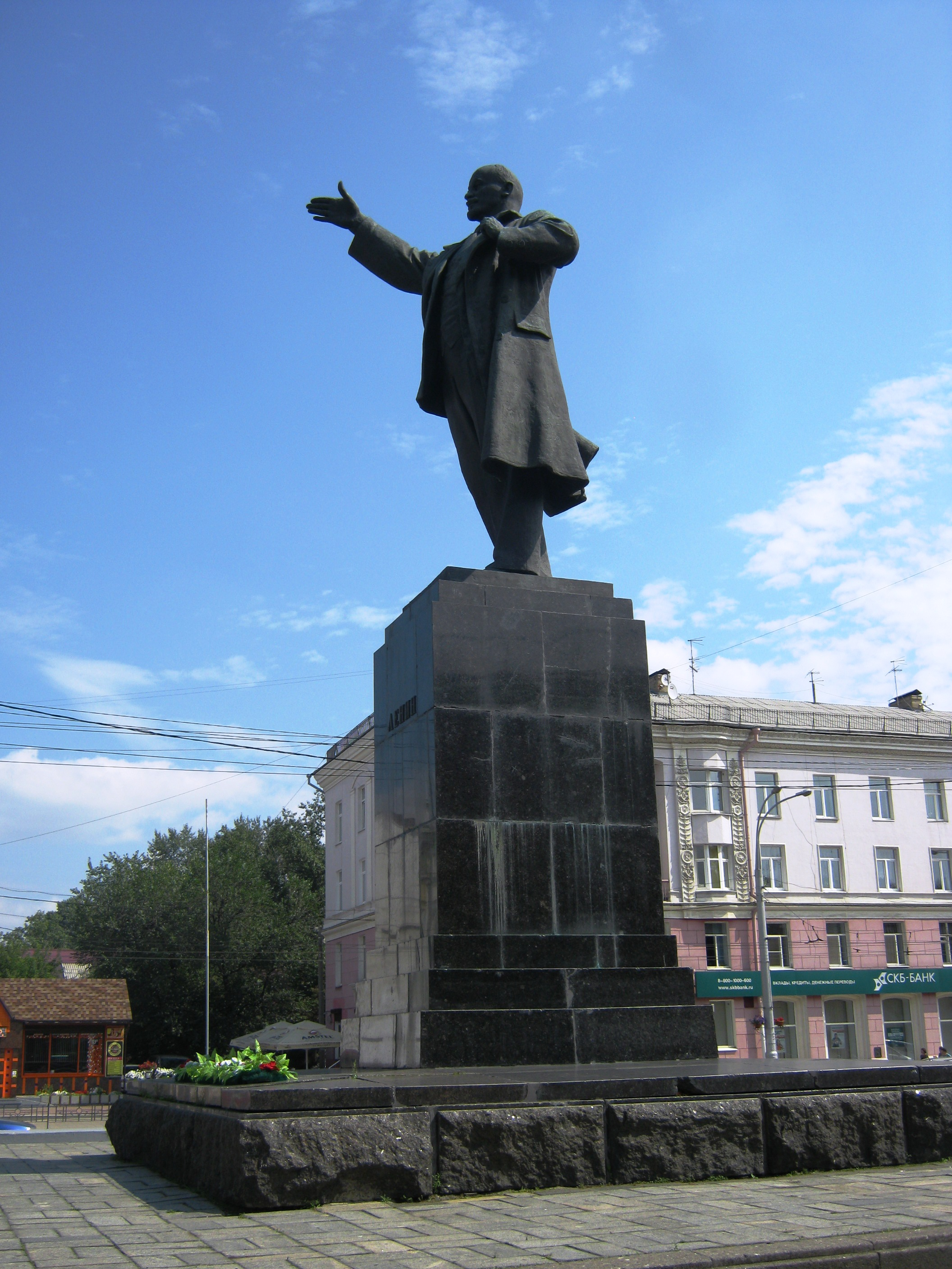 Памятник Ленину в Иркутске на пересечении улиц Ленина и Карла Маркса